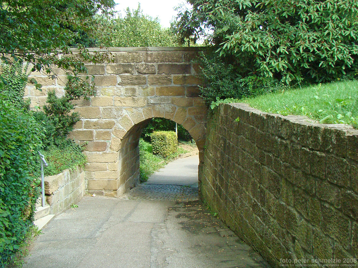 Dorfgraben bei der evang. Kirche in Heilbronn-Frankenbach